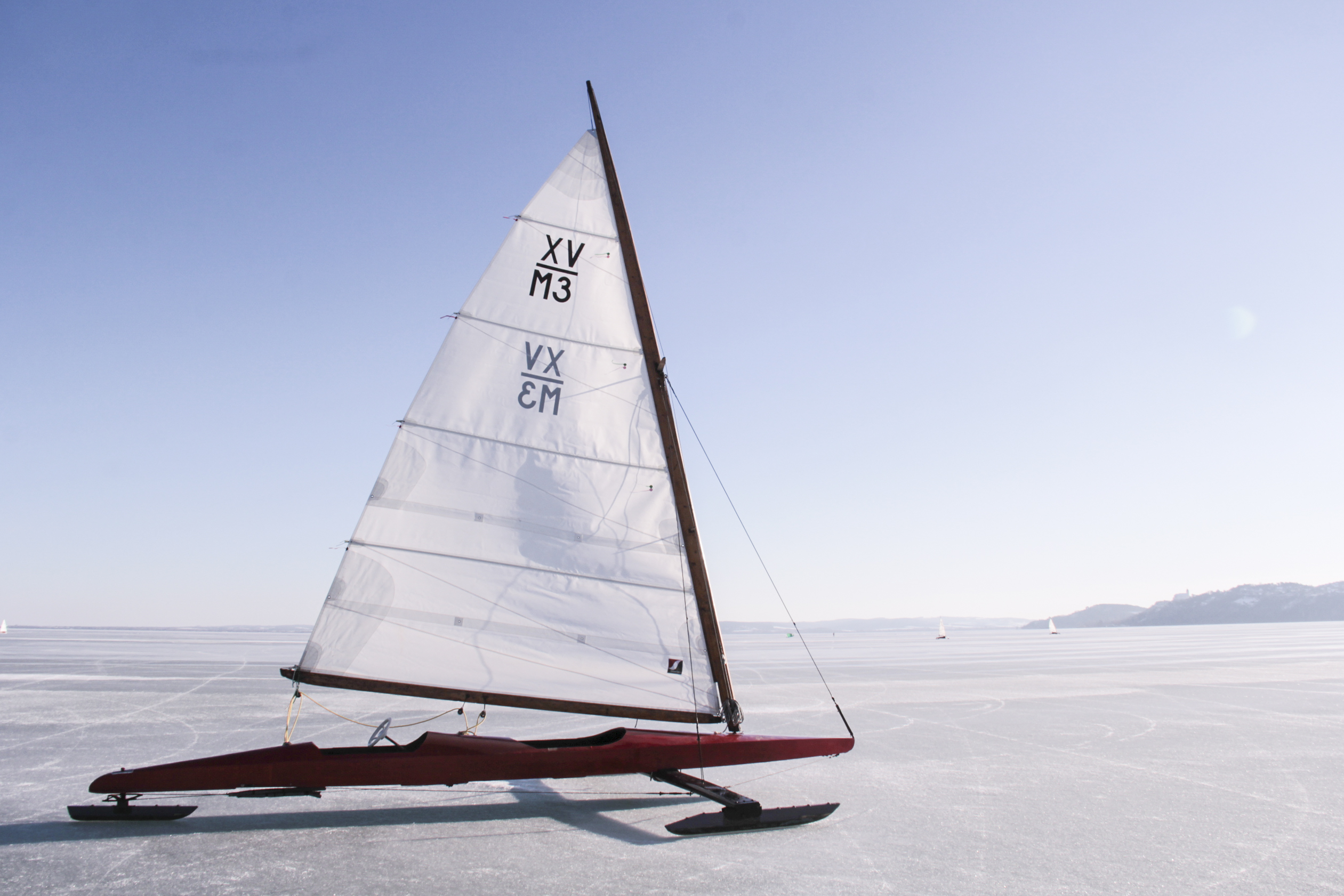 The cockpit view from a Monotype XV on Lake Balaton, Hungary